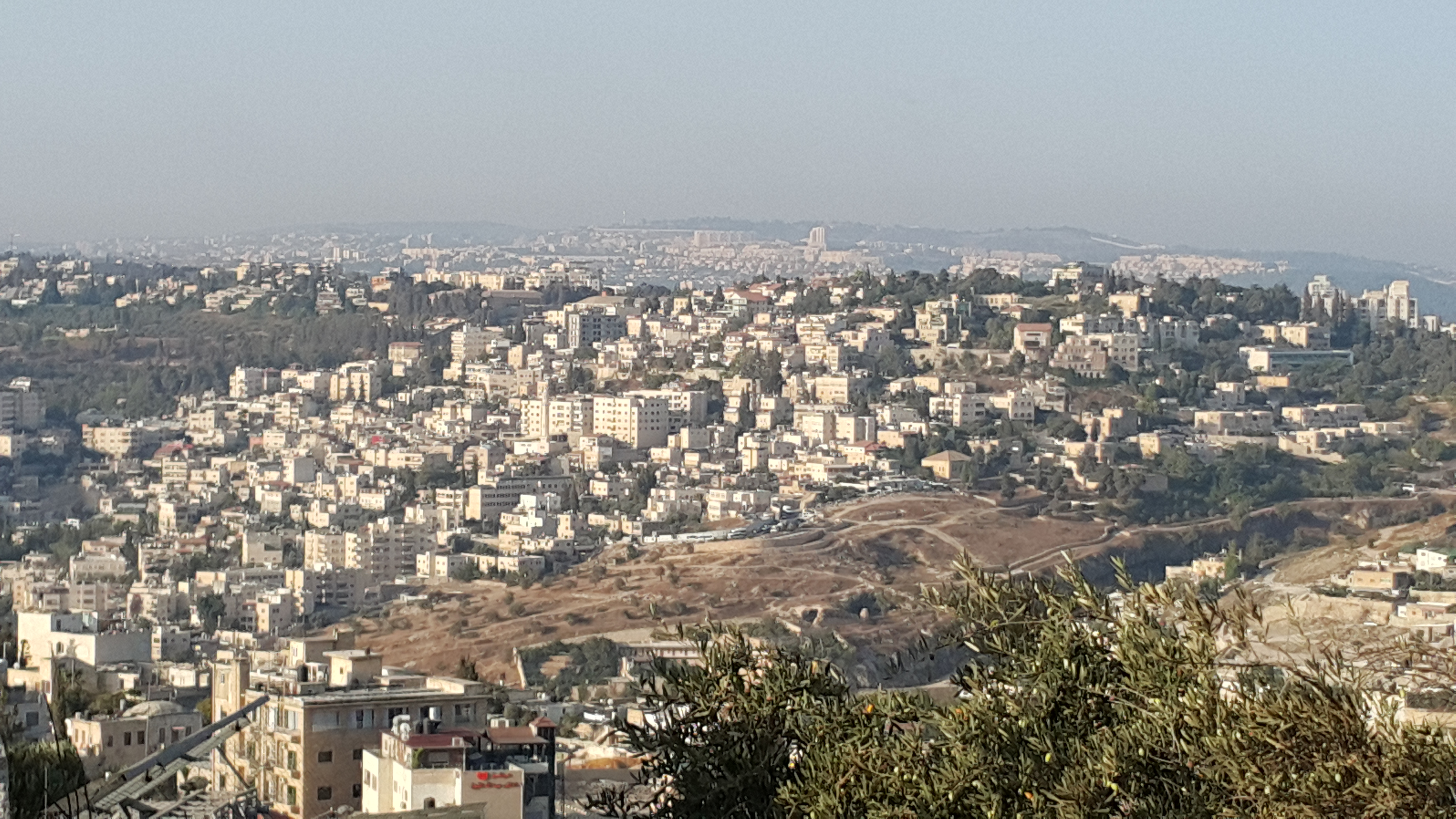 אבו תור בירושלים